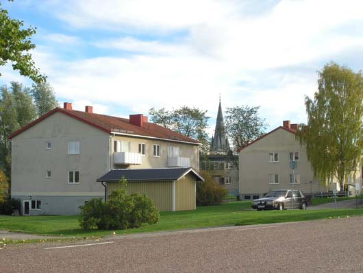 Från mina egna bilder. Fotograf: Tommy Halvarsson